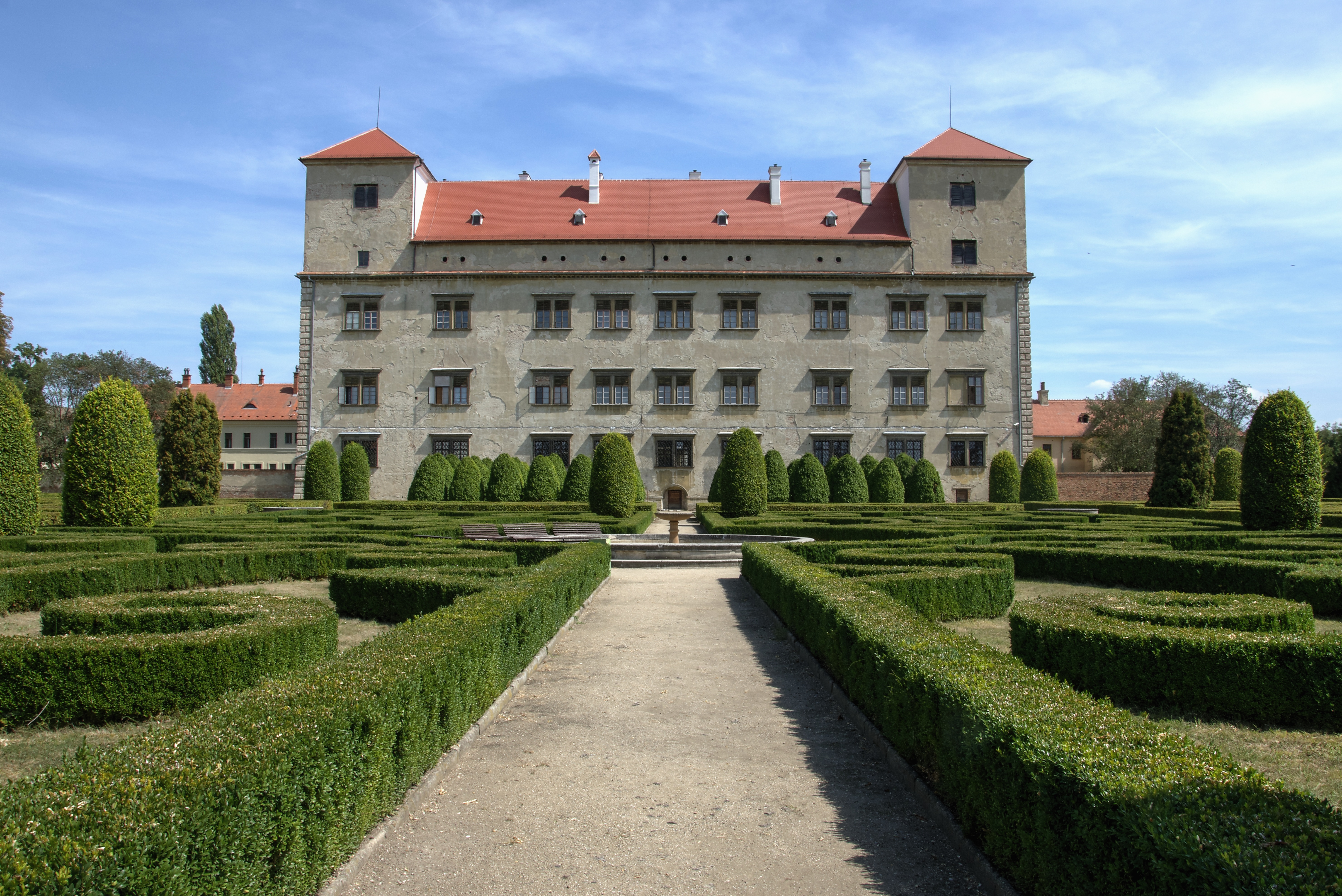 Zámek Bučovice, Zámecká 1, Bučovice.